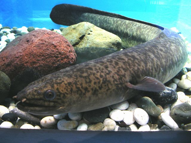 オオウナギ, 長崎ペンギン水族館飼育個体 (Anguilla marmorata, Nagasaki Penguin Aquarium)